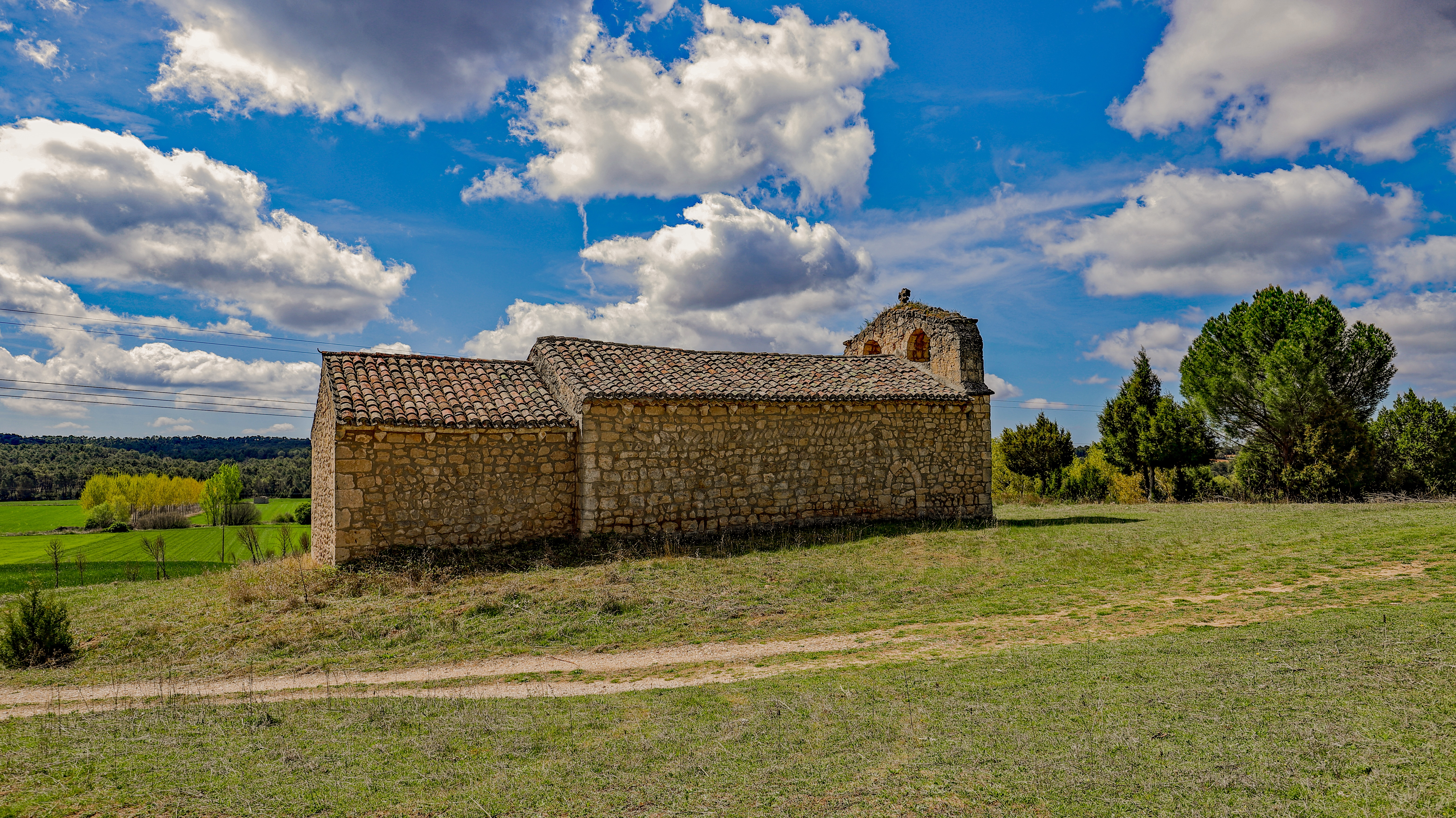 Baños de Valdearados es un municipio de la comarca Ribera de Duero, en la provincia de Burgos.